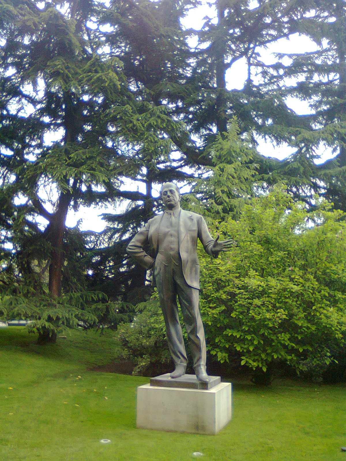 La estatua de Juan Yarur en los jardines del Museo de la Moda de Santiago de Chile. Vitacura, 14 de octubre de 2011.